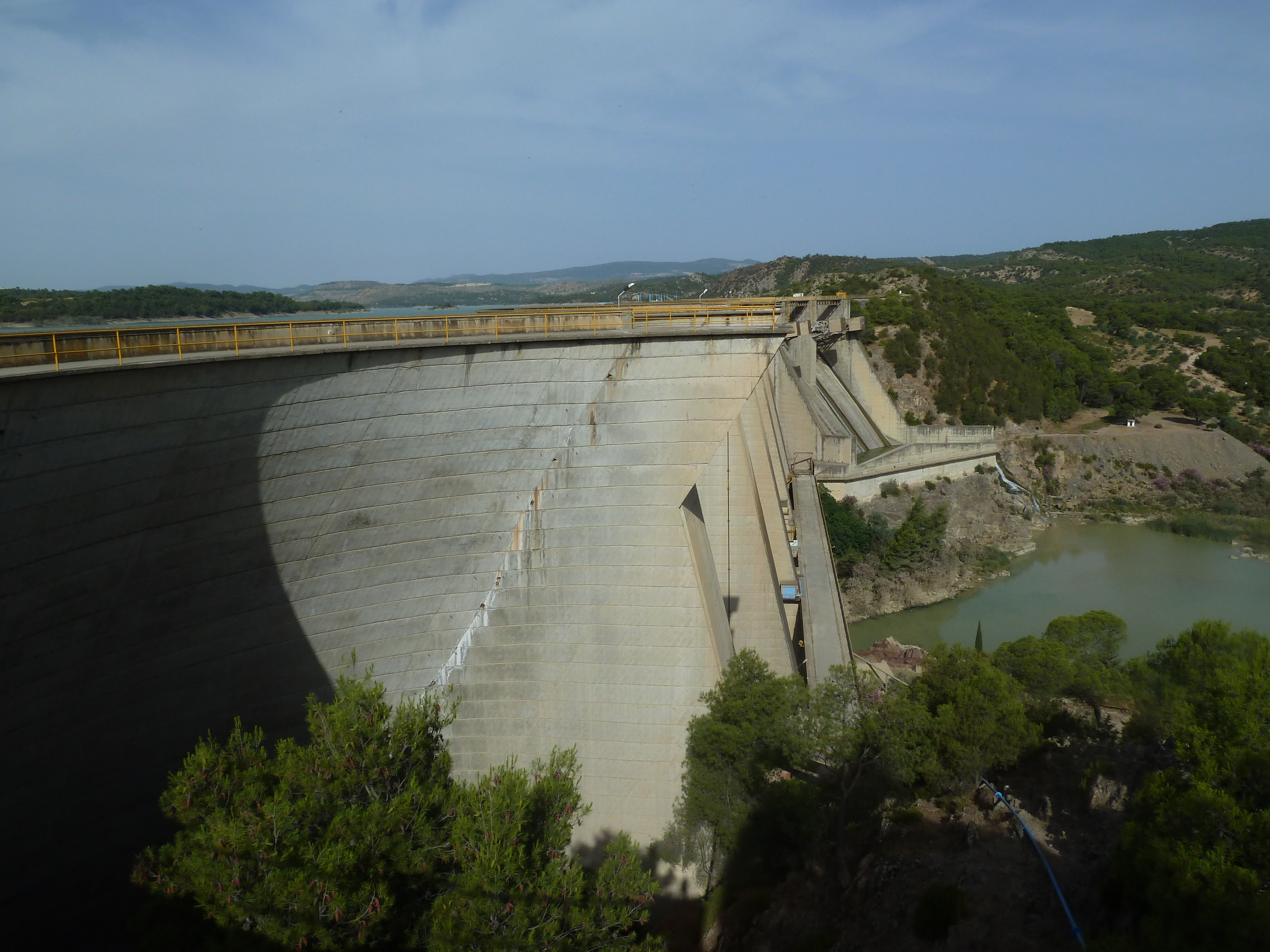 Le barrage Mellègue en Tunisie, situé à environ 7 kilomètres à l'ouest de la ville de Nebeur dans le gouvernorat du Kef.